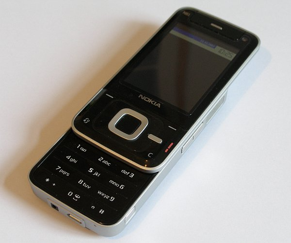 Nokia N81-3 silver/dark grey